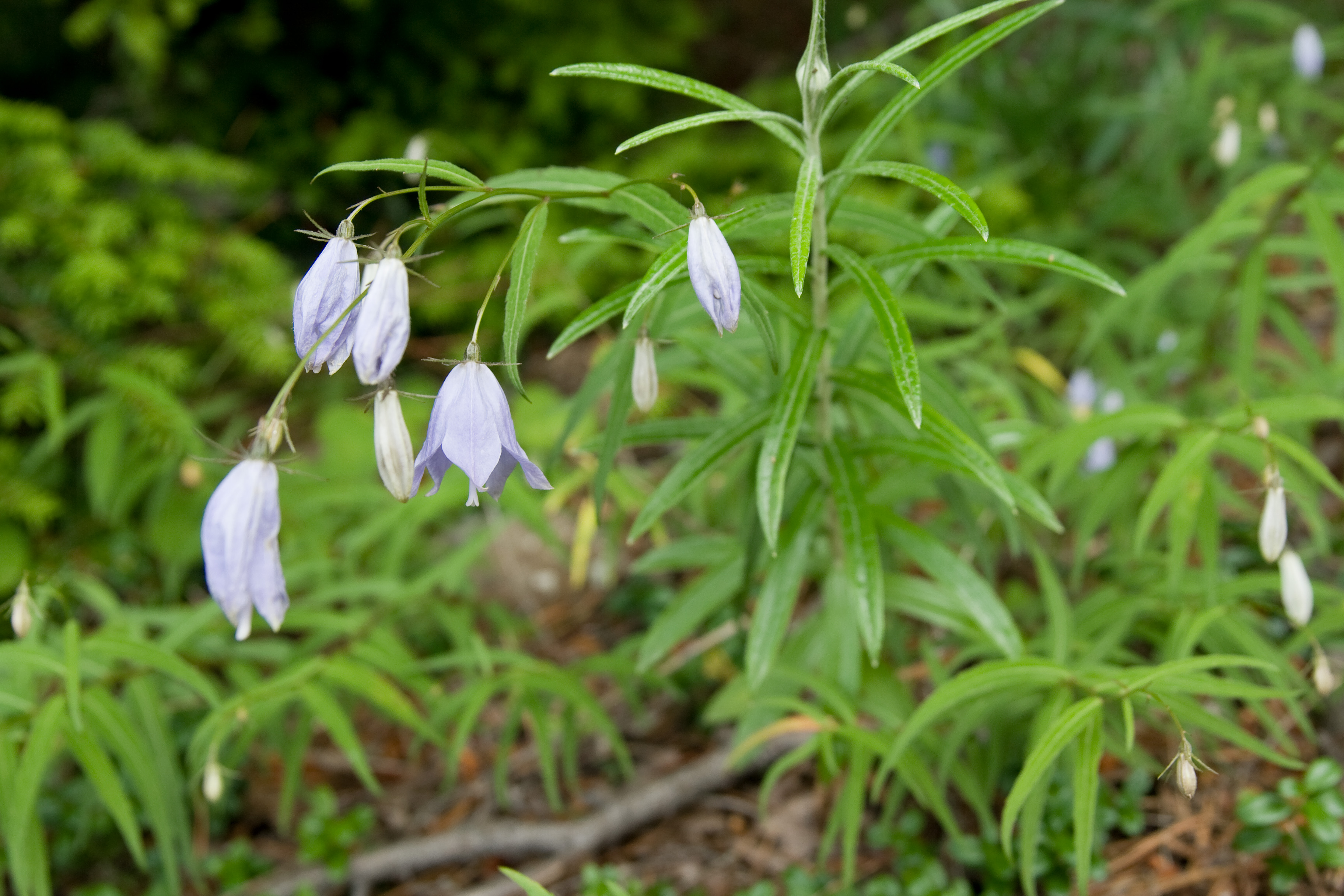 ヒメシャジン (学名:Adenophora nikoensis)